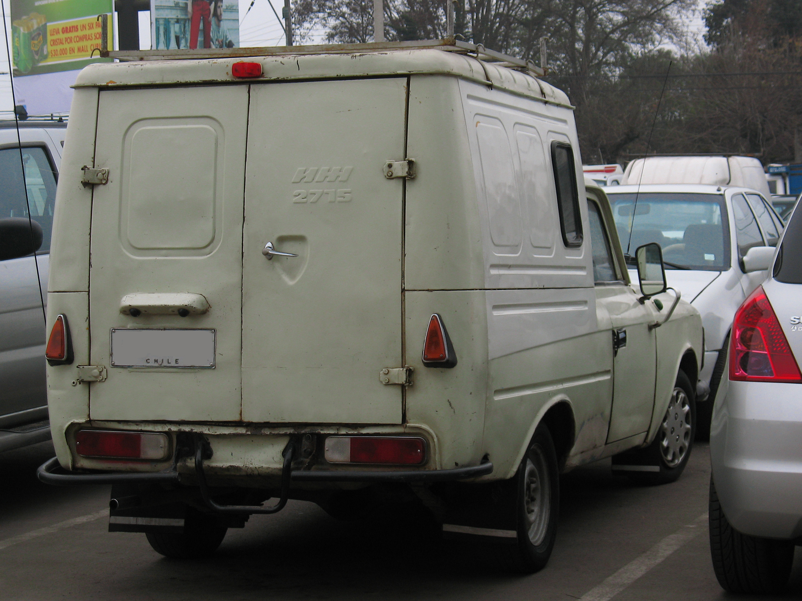 iZH 2715 Cargo 1990